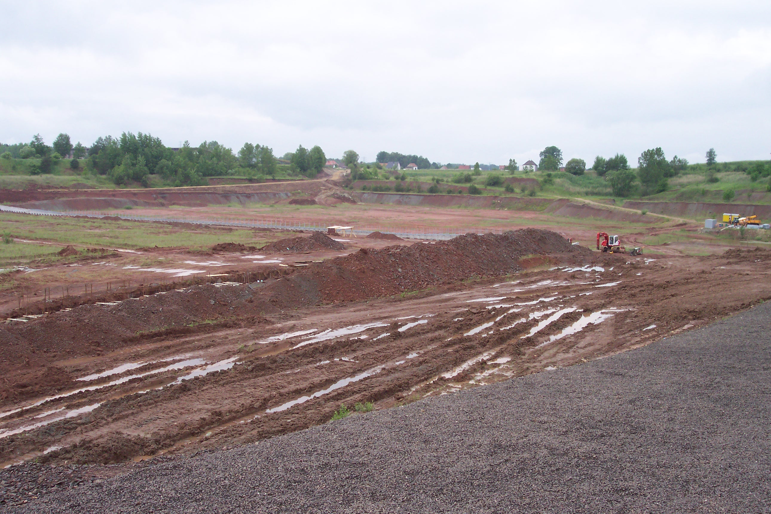 Tongrube von Krasiejów (Oberschlesien, Polen) während der Umgestaltung zum Dinopark, Blick vom Paläontologischen Pavillon nach Südwesten